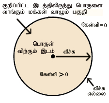 பகுப்பு:தமிழில் விளக்க வரைபடங்கள்